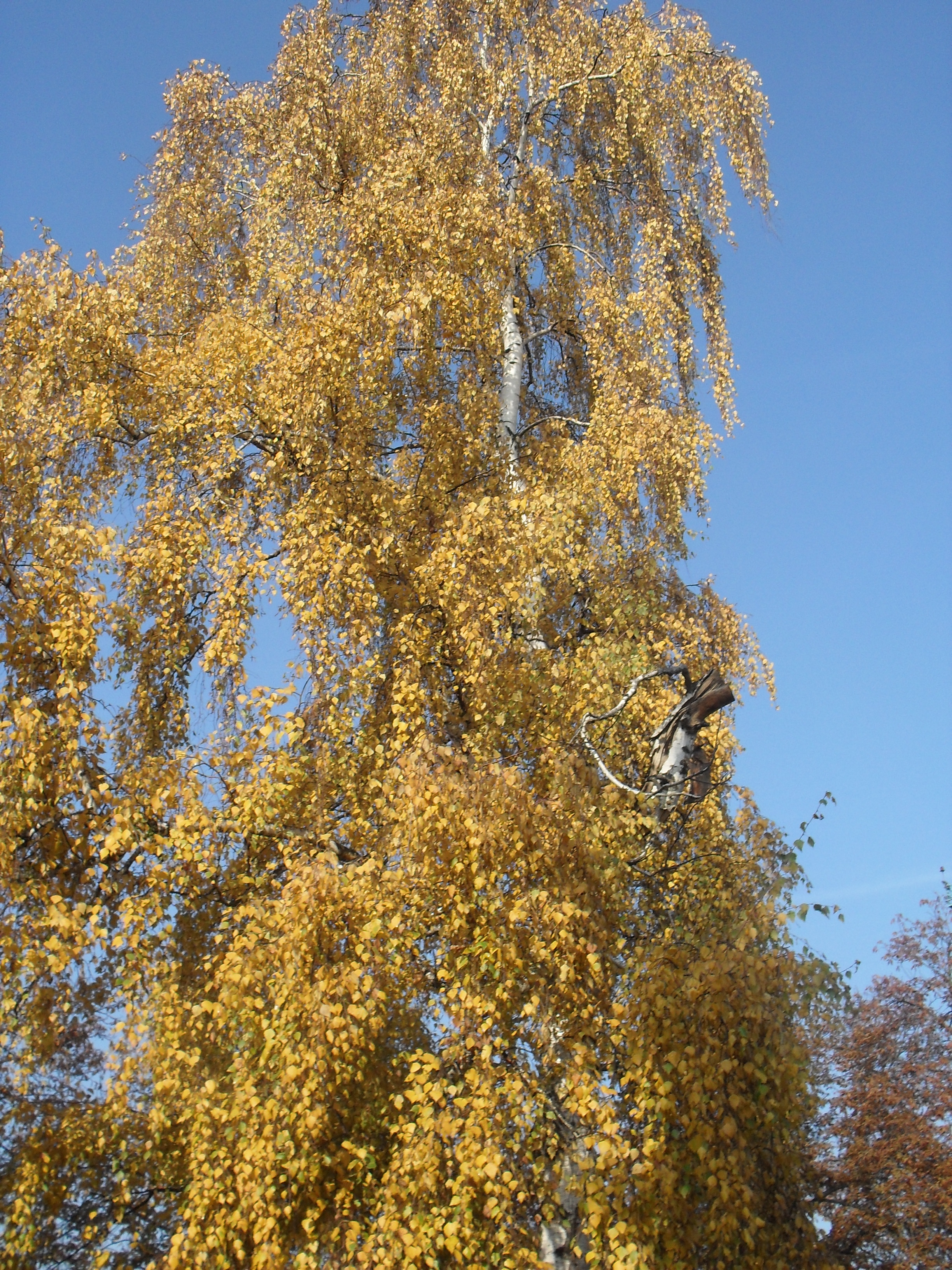 Brzoza jesienią w Legnicy